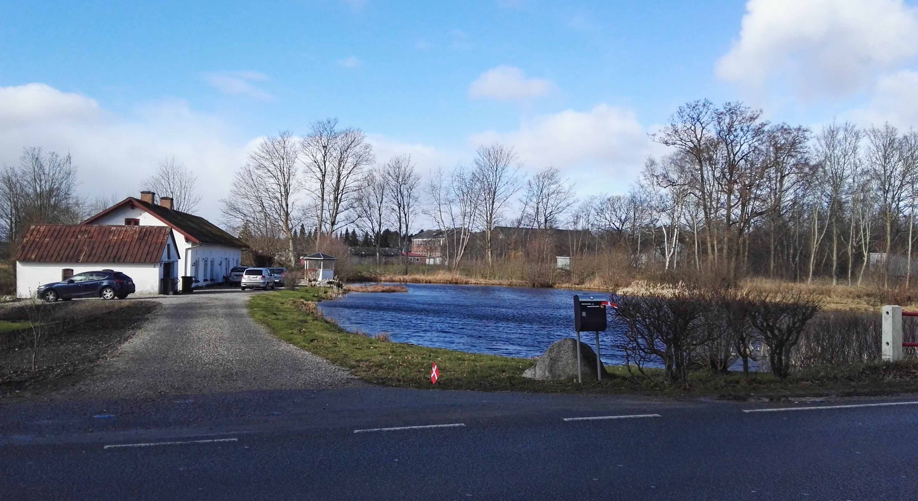 Mølledammen ved Ryomgård